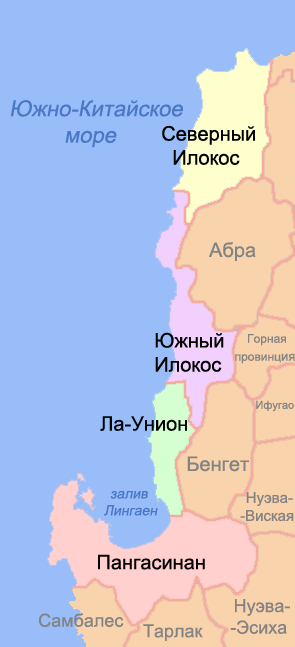 Карта провинций региона Илокос